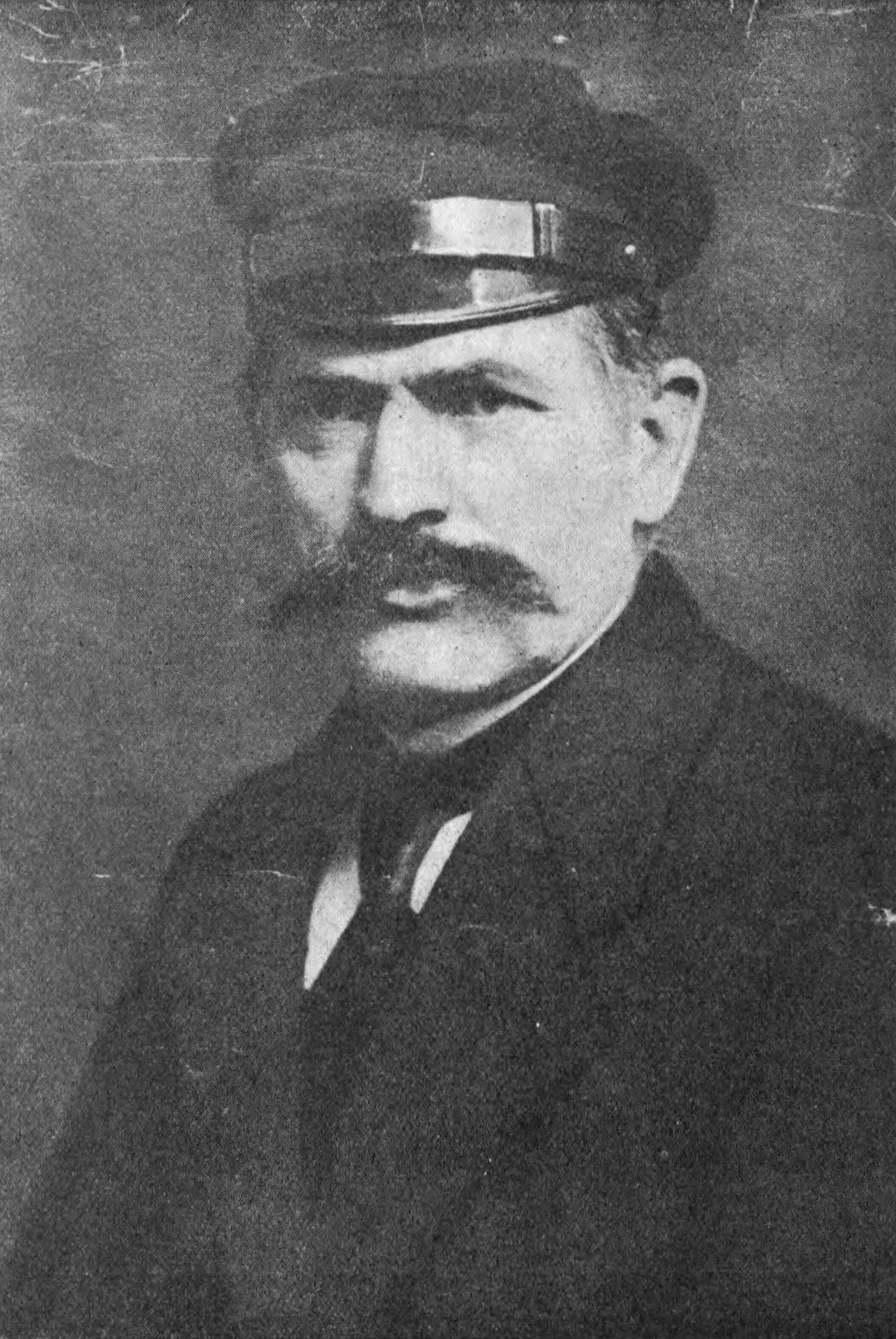 Antoni Abraham, ilustracja z książki Władysława Pniewskiego "Antoni Abraham (1869-1923). Wielki patrjota z ludu kaszubskiego"